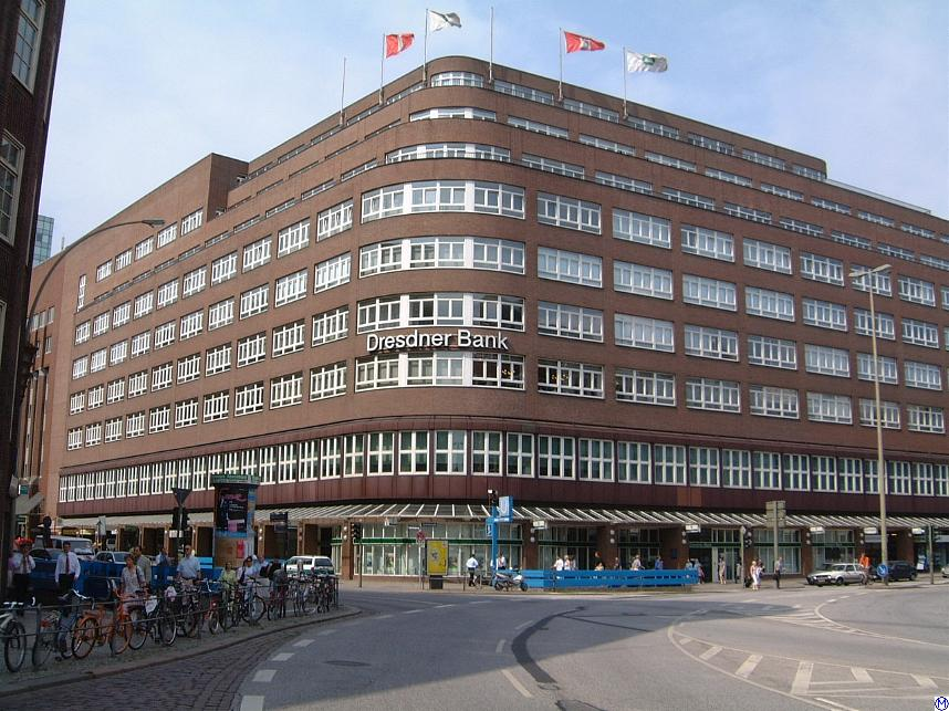 Deutschlandhaus am Hamburger Gänsemarkt Blickrichtung: nach Nordwesten (vom Gänsemarkt) — links: Valentinskamp; rechts: Dammtorstraße